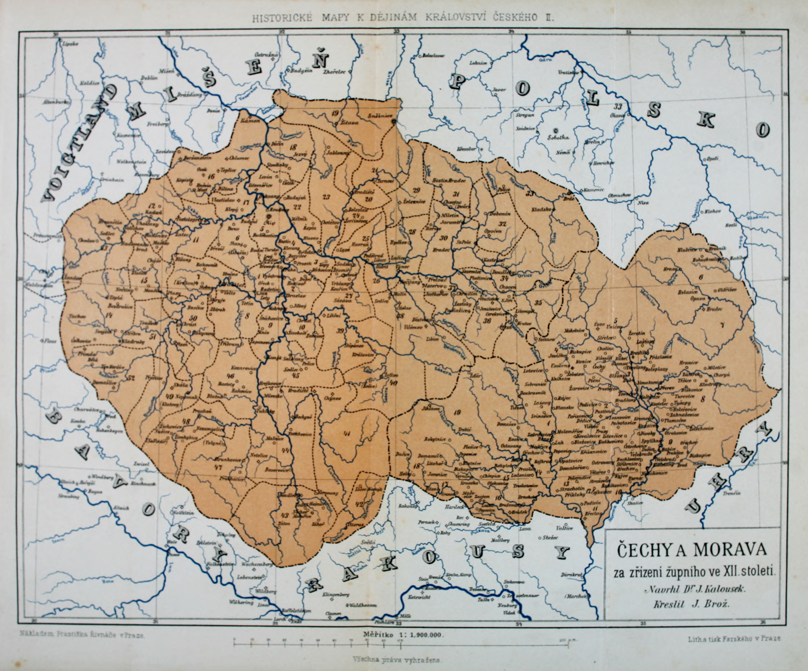 Čechy a Morava za zřízení župního ve XII. století, historická mapa